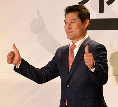 MBC 2015 메이저리그 & KBO리그 기자간담회